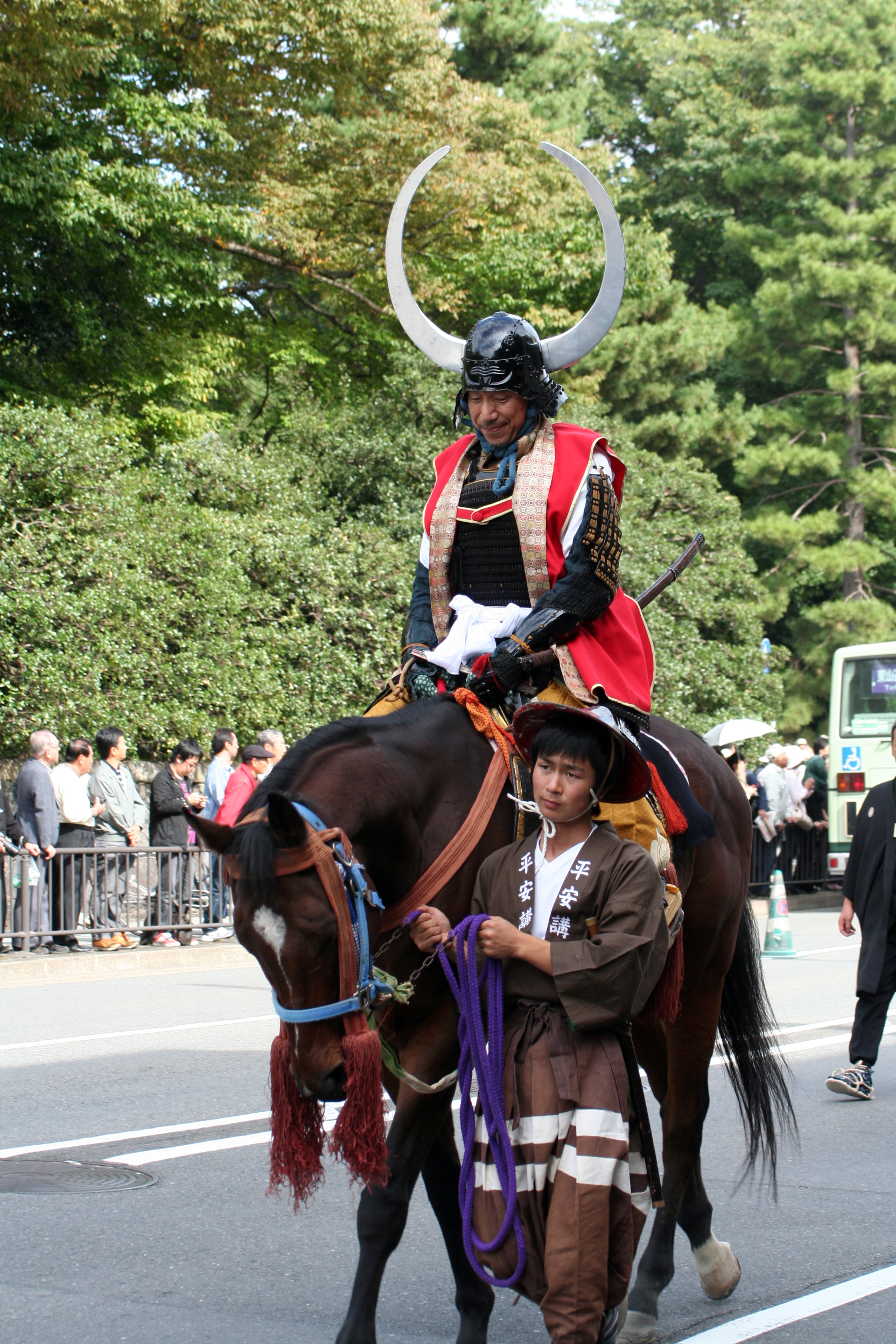 京都府京都市にて開催された時代祭。正午の御所から平安神宮までの行進の様子。2009年10月22日撮影。